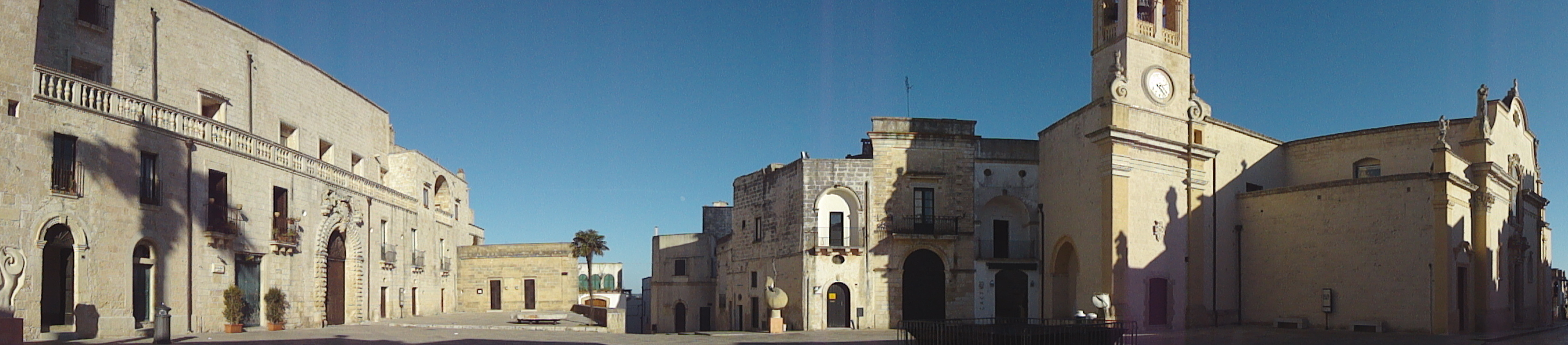 Panorama Specchia Lecce